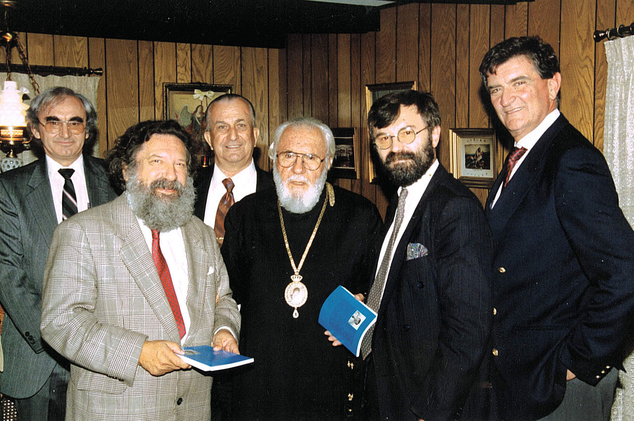 У Чикагу.